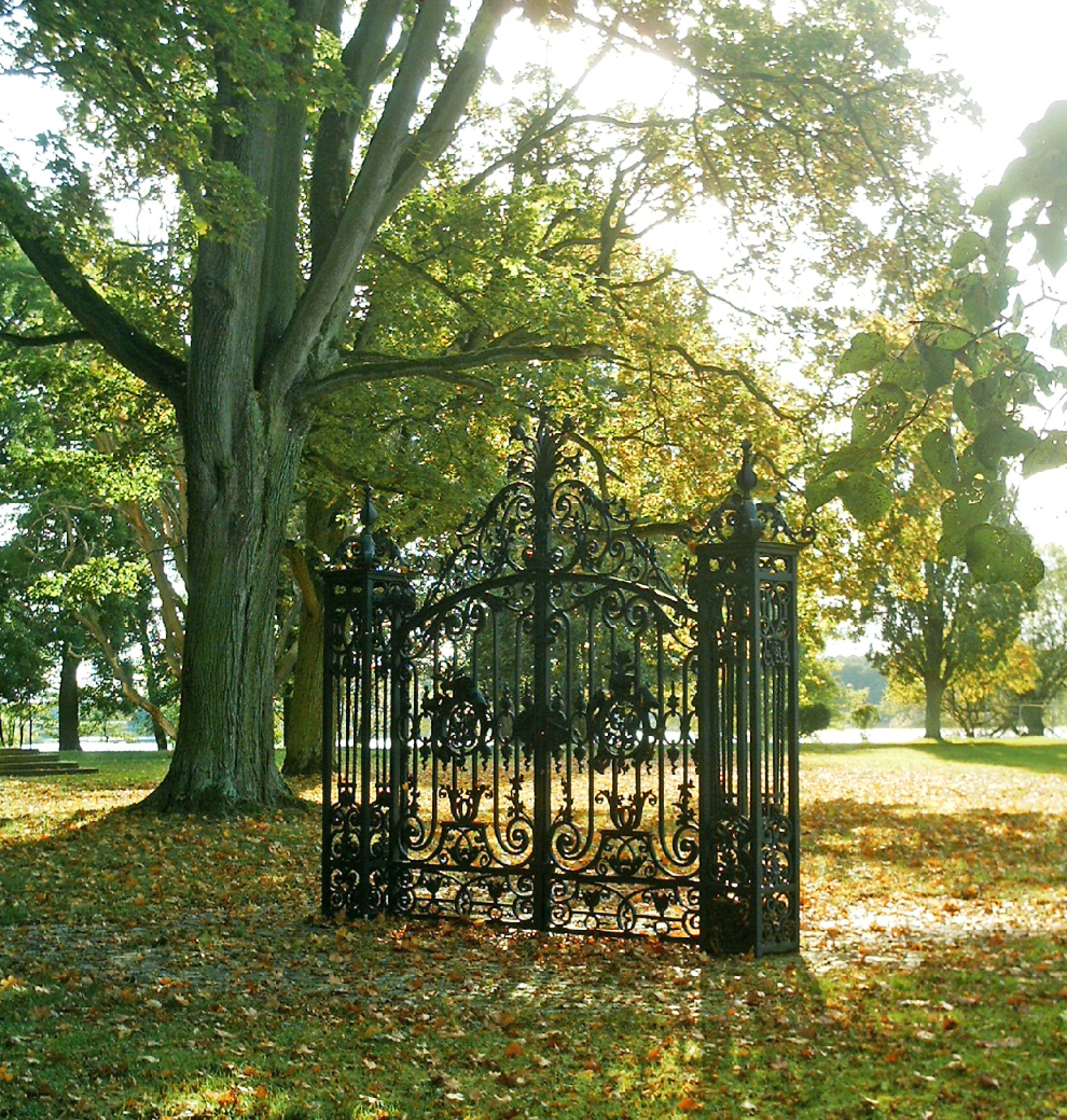 Eingangsportal zum Schloss Ivenack